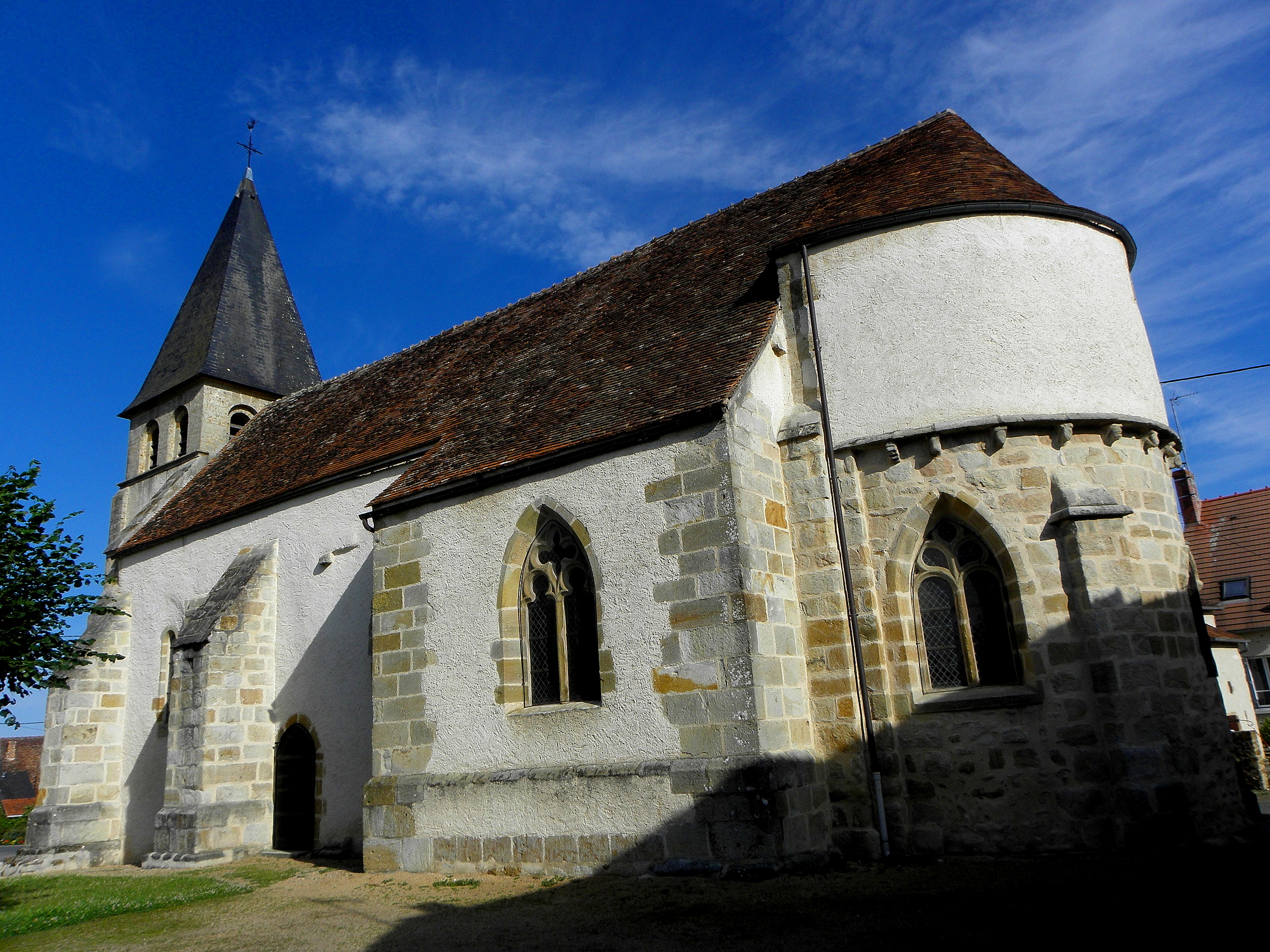 Église Saint-Cyprien de Saint-Civran (36).